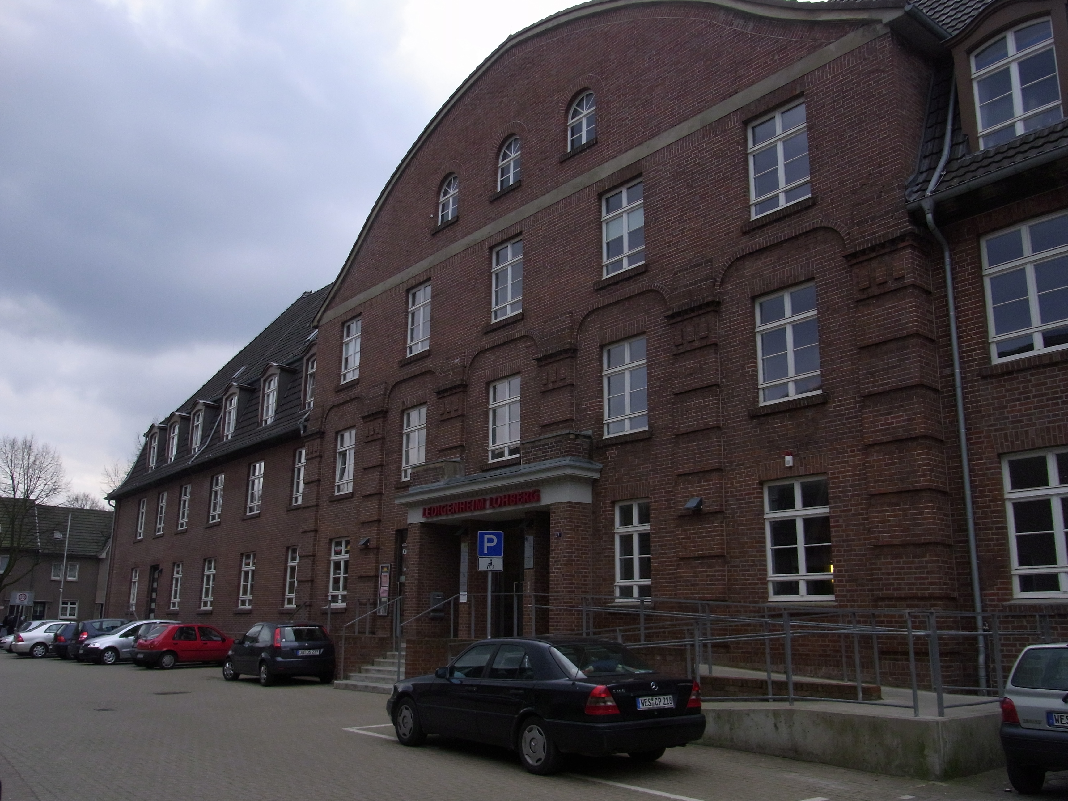 Kolonie Lohberg in Dinslaken-Lohberg, „Ledigenheim Lohberg“ This is a photograph of an architectural monument.